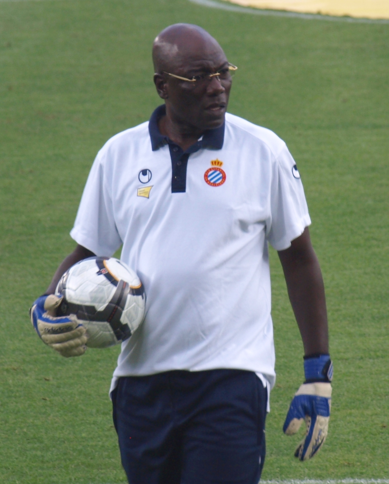 Thomas Nkono, en su faceta de entrenador de porteros del RCD Español en una imagen tomada antes del partido de inauguración del Estadio de Cornella-El Prat disputado entre el RCD y el Liverpool FC